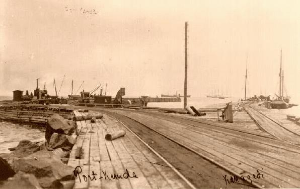 Kunda sadam